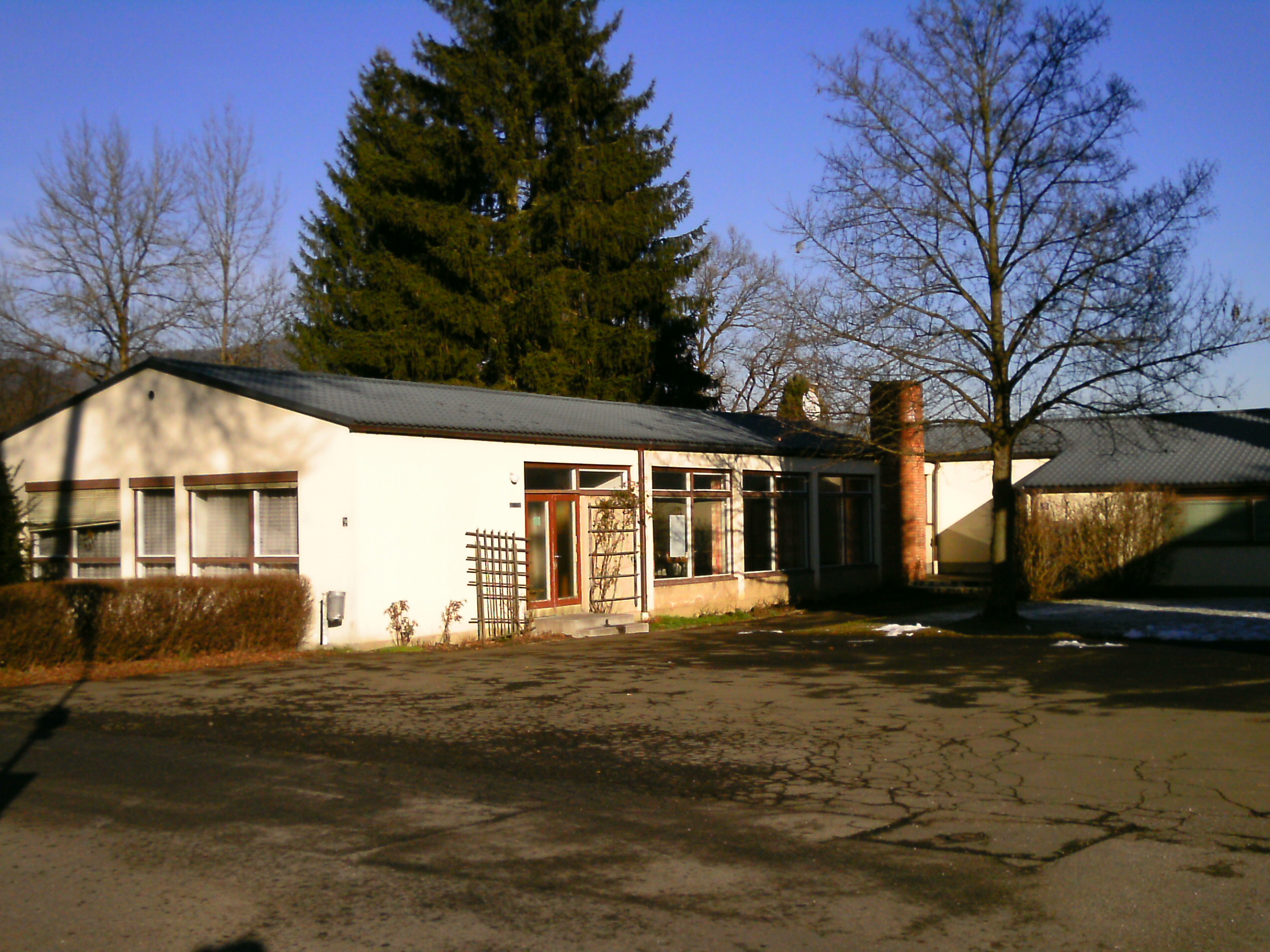 Pfarrhof Kirche Ma.-Königin in Kapfenberg-Schirmitzbühel/Österreich.